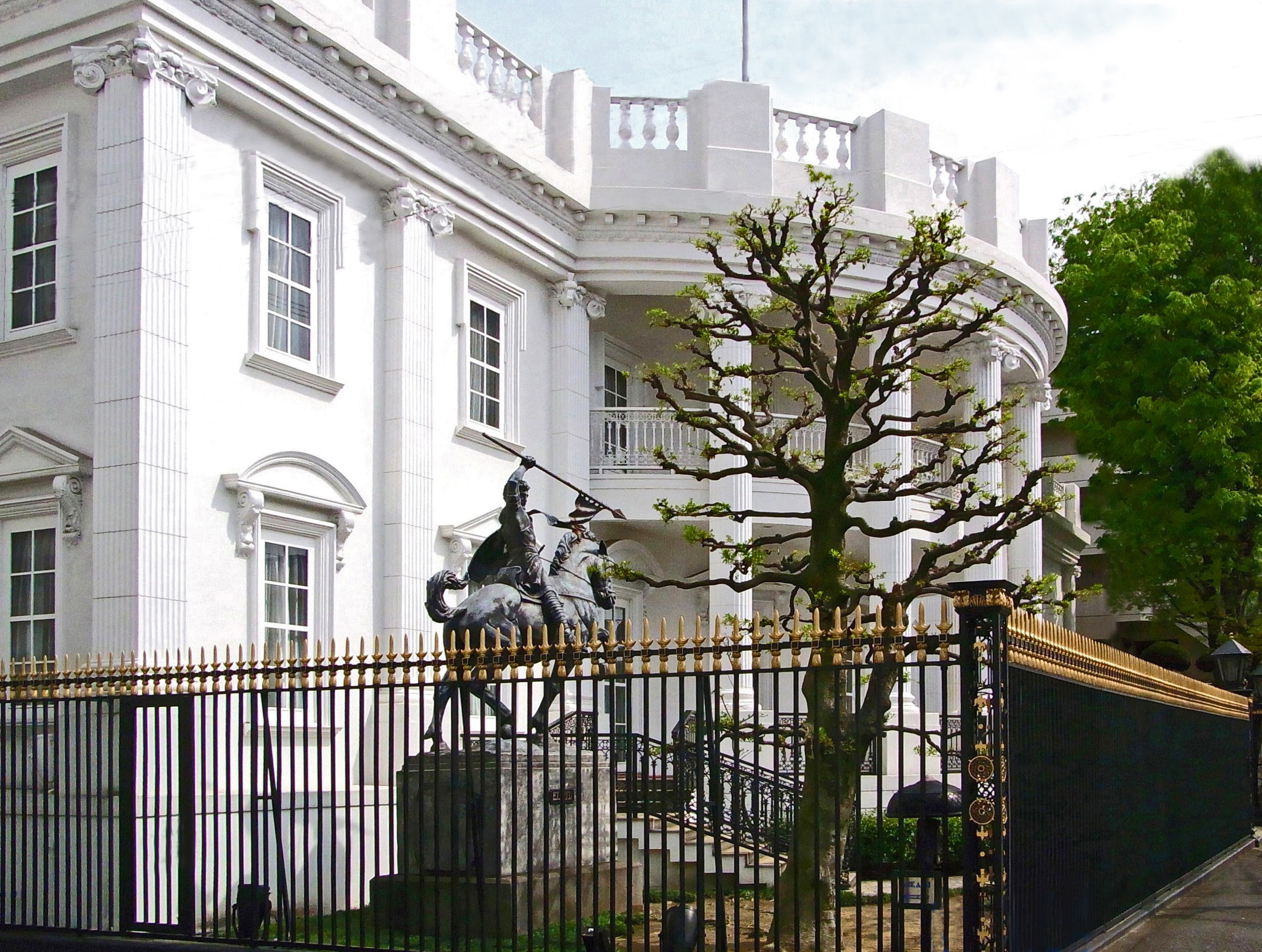 大阪のホワイトハウス